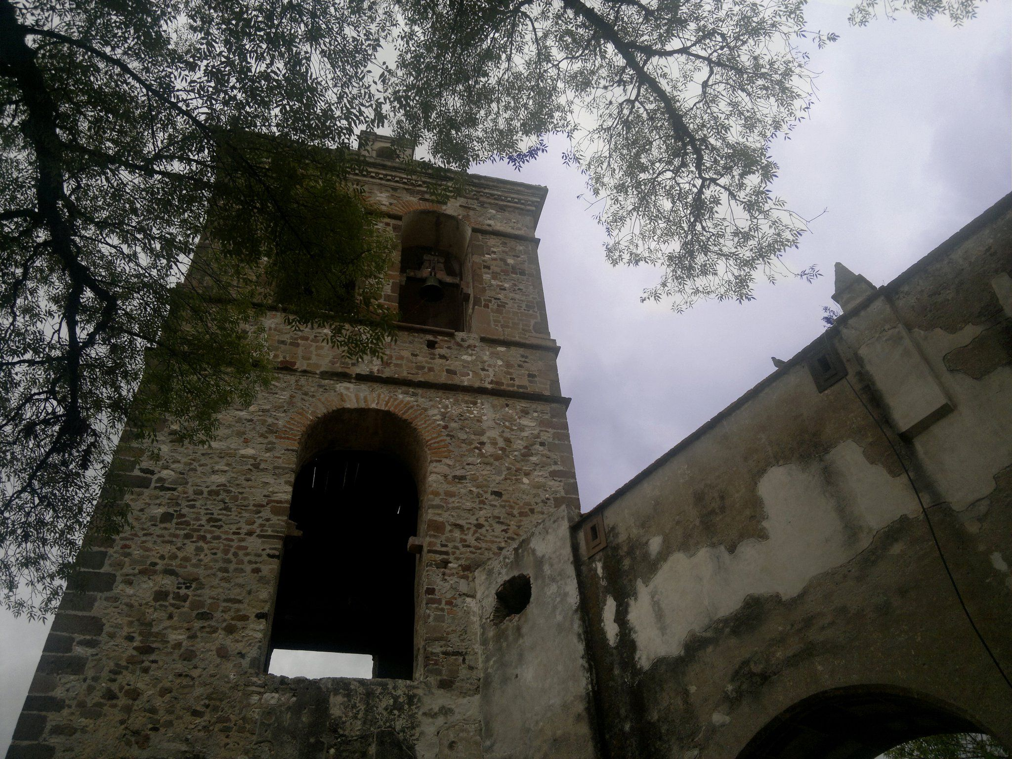 campanario